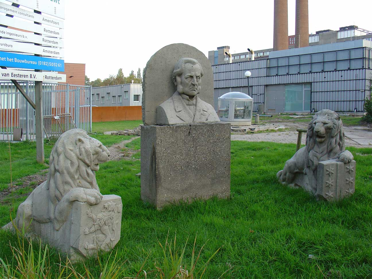 Afbeelding van Andrinus Antonie Gijsbertus van Iterson bij Groenehart ziekenhuis locatie Bleuland